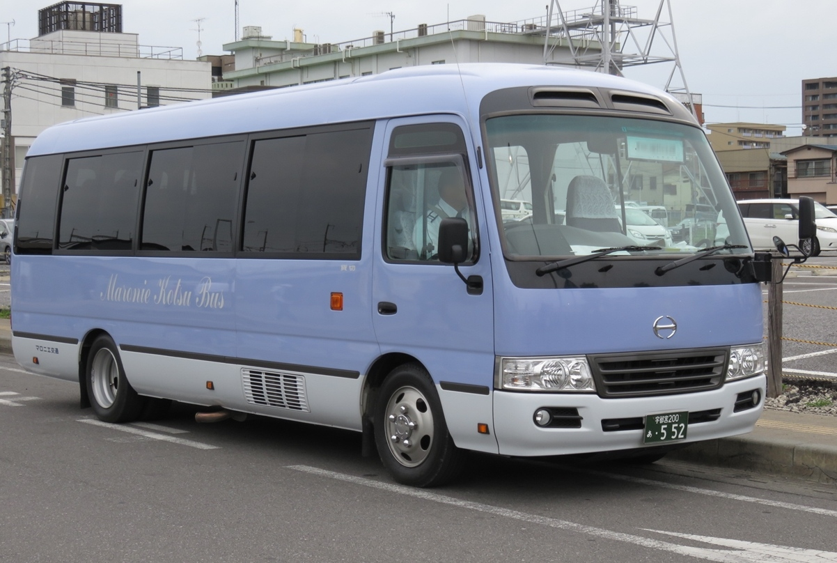 マロニエ交通の日野リエッセ２ 旧標準カラー 撮影場所:JR宇都宮駅東口